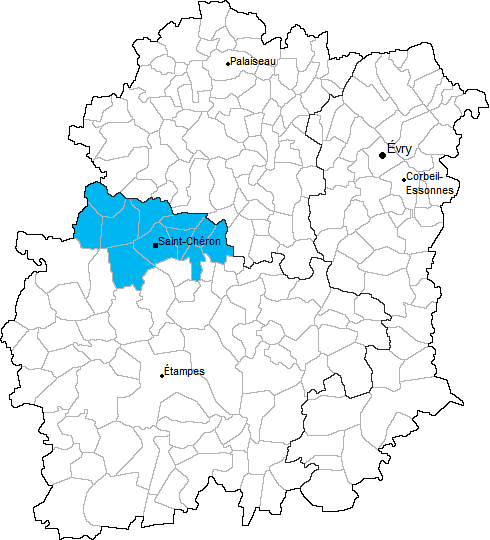 Carte de localisation du canton de Saint-Chéron en Essonne (91)